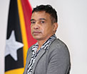 Sabino Soares, Abgeordneter des Nationalparlaments Osttimors